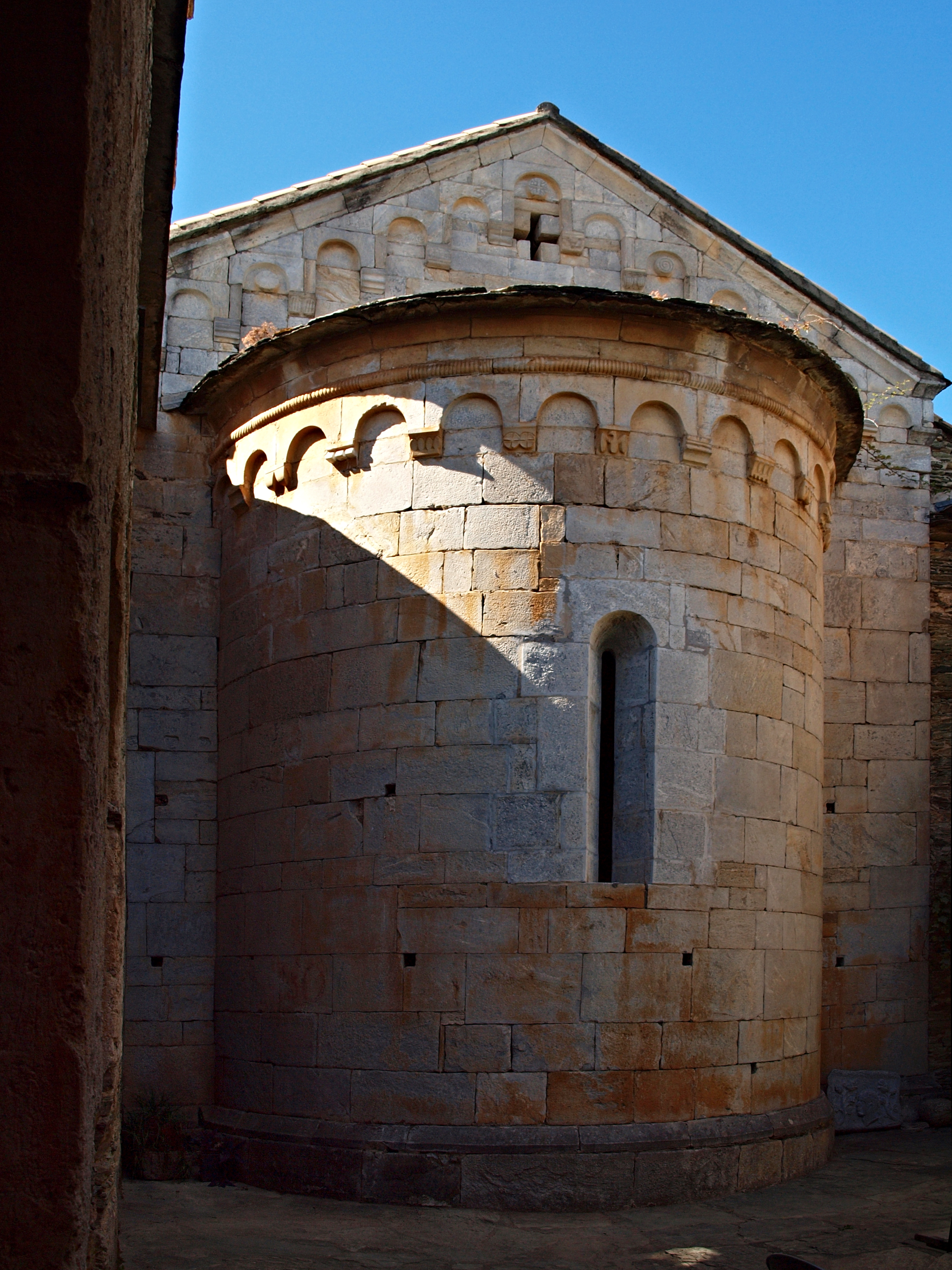 Santo-Pietro-di-Tenda (Corsica) - Chevet de l'église conventuelle Saint-Joseph désaffectée.